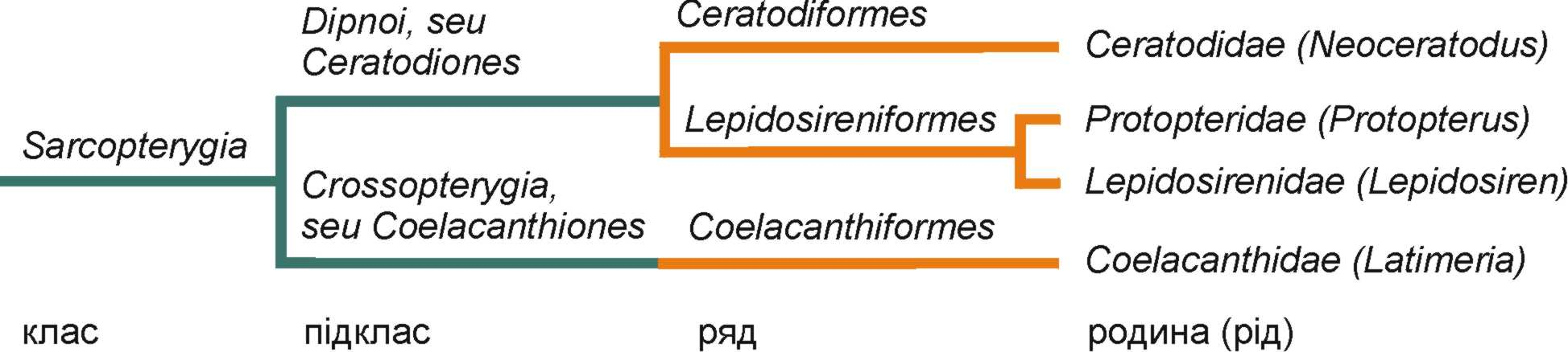 схема класифікації сучасних (Sarcopterygii). оригінальний рисунок